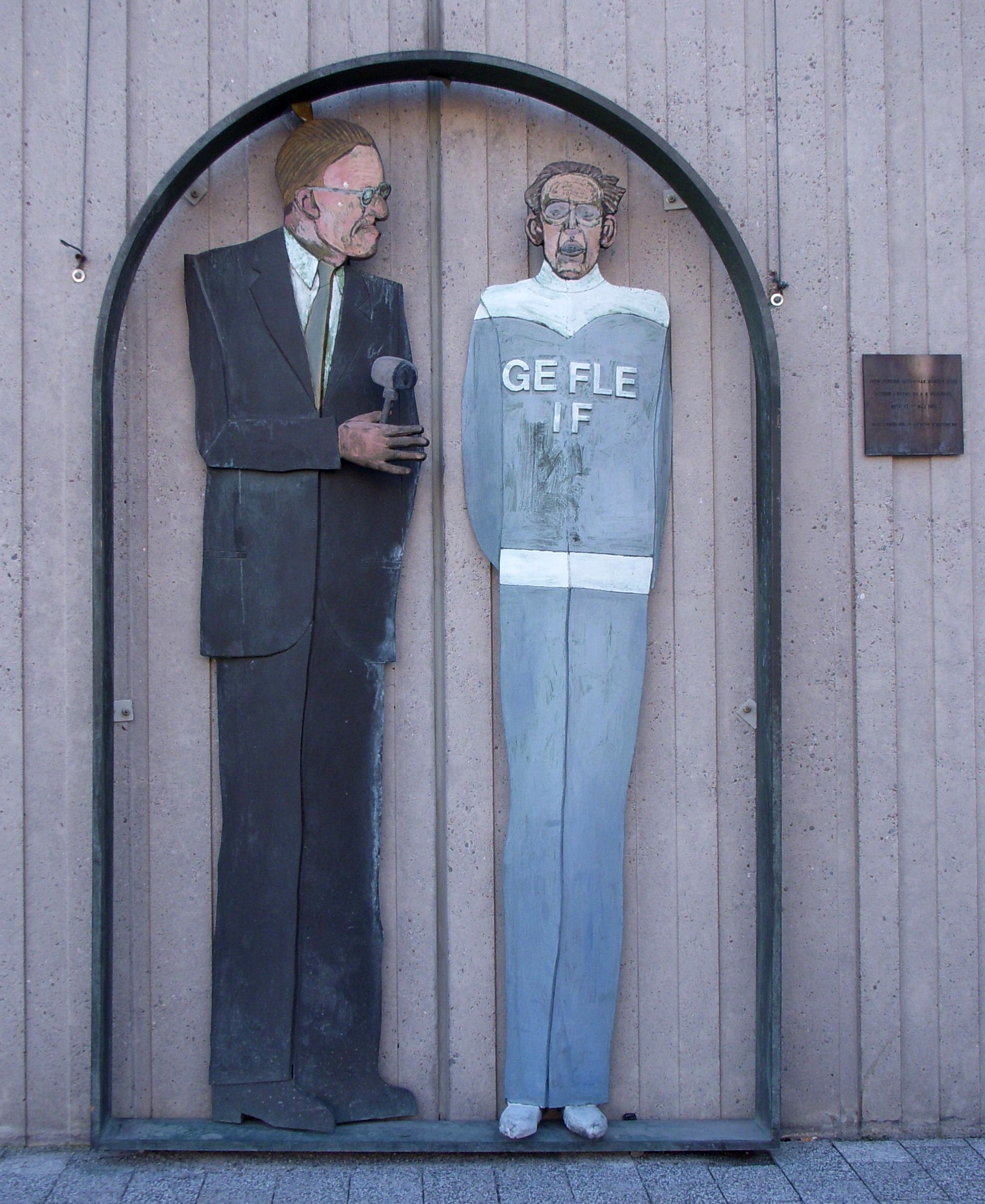 Sveriges Radio, skulptur av K.G. Bejemark utanför byggnad i Stockholm, Sven Jerring intervjuar Gunder Hägg